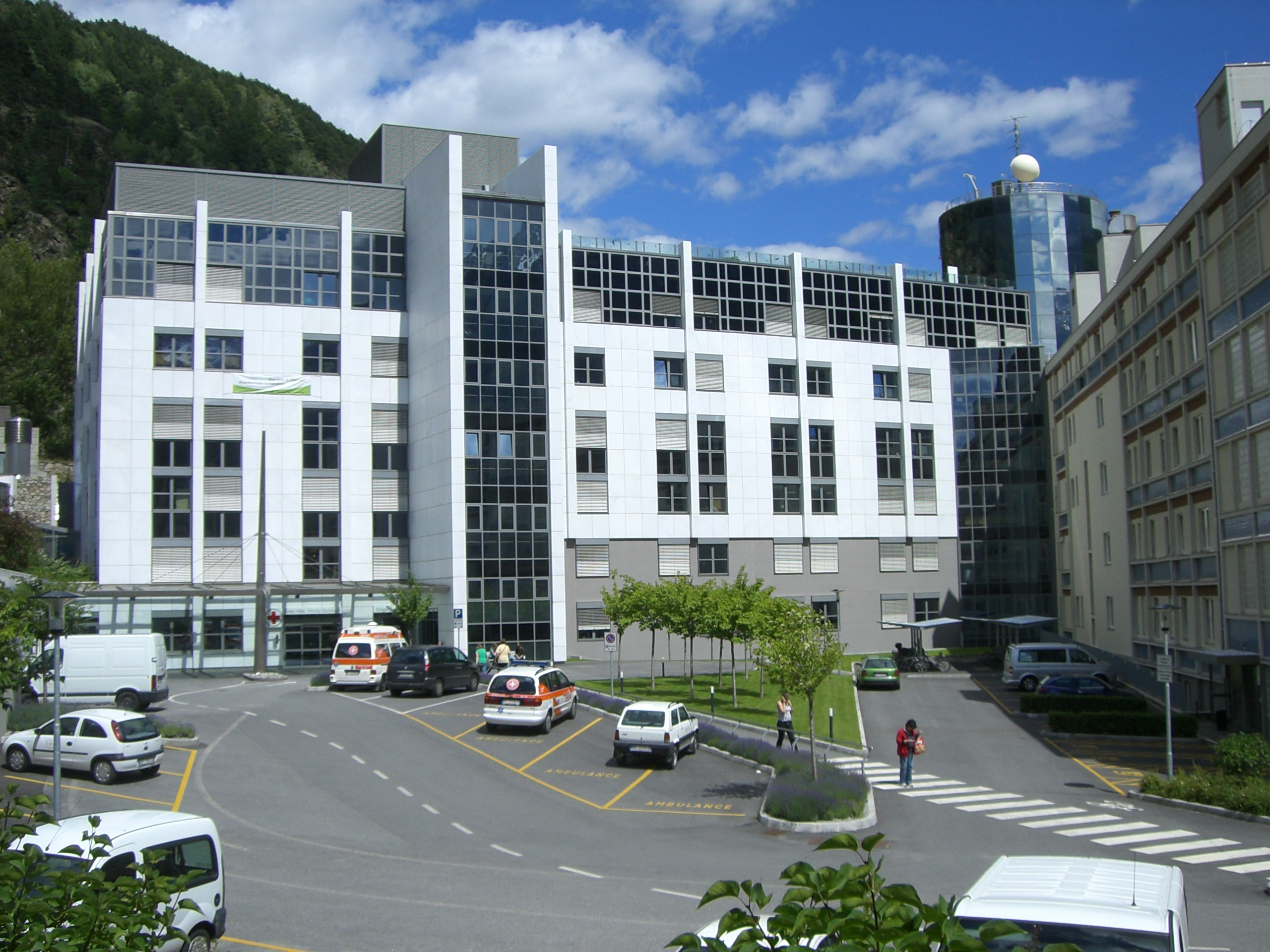 Krankenhausgebäude in Schlanders